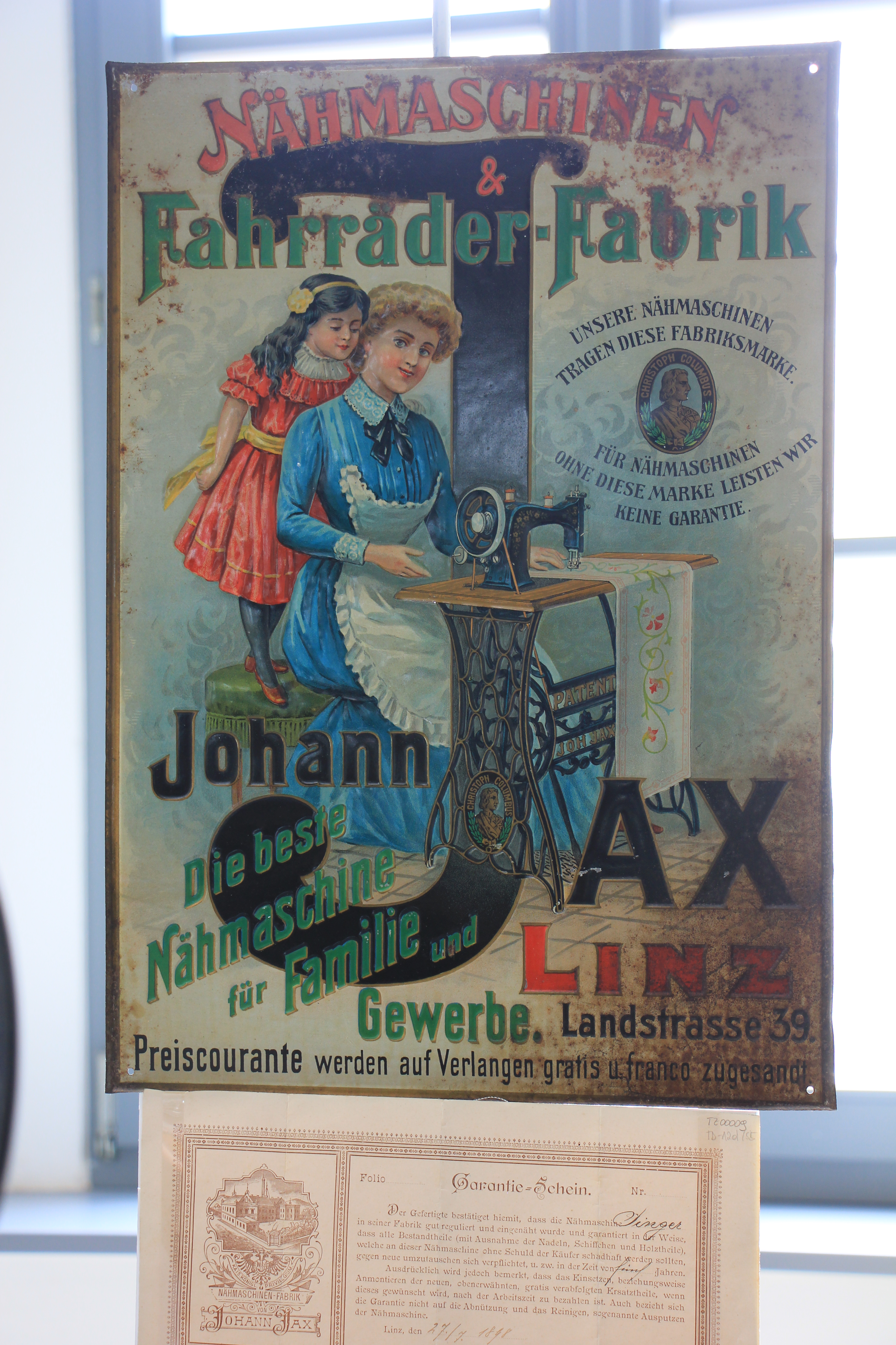 Werbetafel der Firma Jax - Nähmaschinen im Textilen Zentrum Haslach in Haslach an der Mühl, Oberösterreich